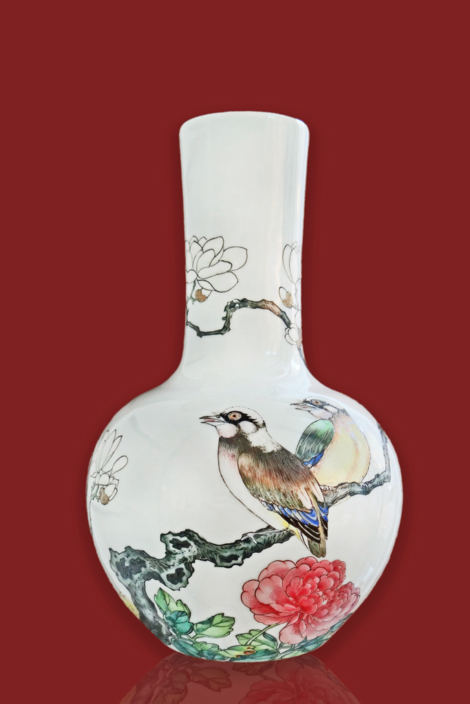 Vase bouteille à décor de fleurs et oiseaux Chine du sud, Jiangxi Jingdezhen Dynastie Qing, première moitié du XVIIIè siècle Collection Ernest Grandidier (G1362) Musée national des arts asiatiques-Guimet Le catalogue de la collection Grandidier (RMN-Guimet) Extrait de la base de la collection Grandidier Vase bouteille à base rétrécie, panse globulaire et long col fin. Décor polychrome sur fond blanc sur le thème "fleurs et oiseaux" : deux oiseaux perchés sur une branche de magnolia, au-dessus de pivoines. Intérieur blanc. La pâte est d'une grande finesse.